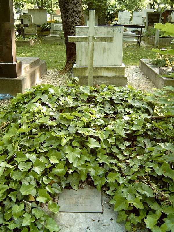 Móricz Zsigmondné, Simonyi Mária (Szenic, 1888. dec. 4. – Bp., 1959. jún. 21.) drámai színésznő sírja Budapesten. Farkasréti temető: 8/2-1-155.